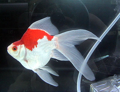 ماهی قرمز ژاپنی